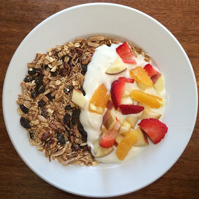 Granola, yogurt, fruit.